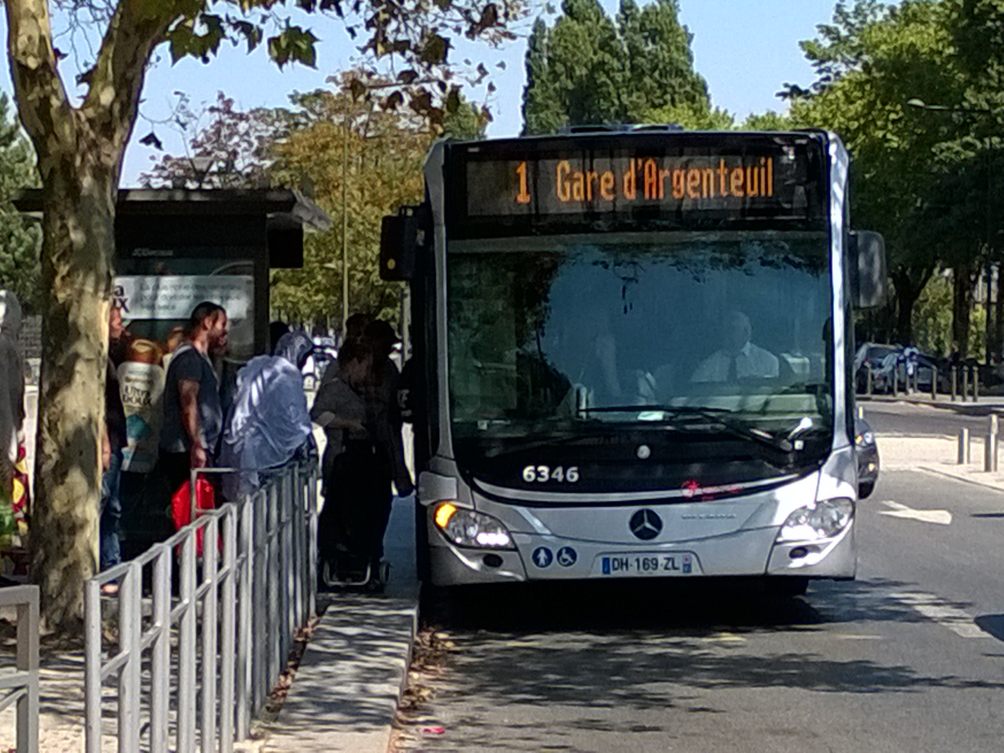 Boulevard de la Résistance, Argenteuil (Val-d'Oise, France).Mercedes-Benz Citaro C2 assurant une course de la ligne 1 pour la gare de Sartrouville, malgré l'erreur de la girouette.